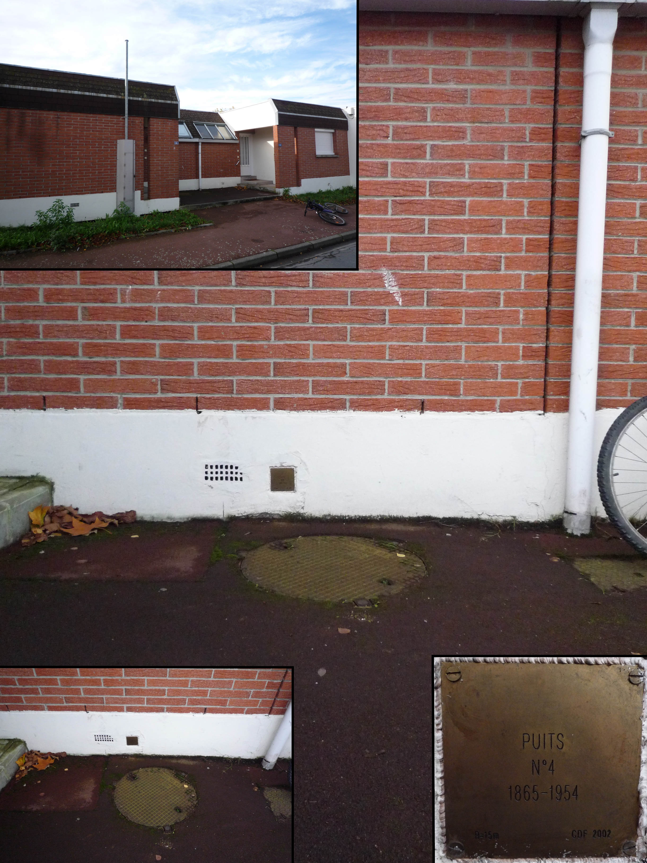 La Fosse n° 4 - 4 bis de la Compagnie des mines de l'Escarpelle était un charbonnage constitué de deux puits situé à Douai (Dorignies), Nord, Nord-Pas-de-Calais, France.